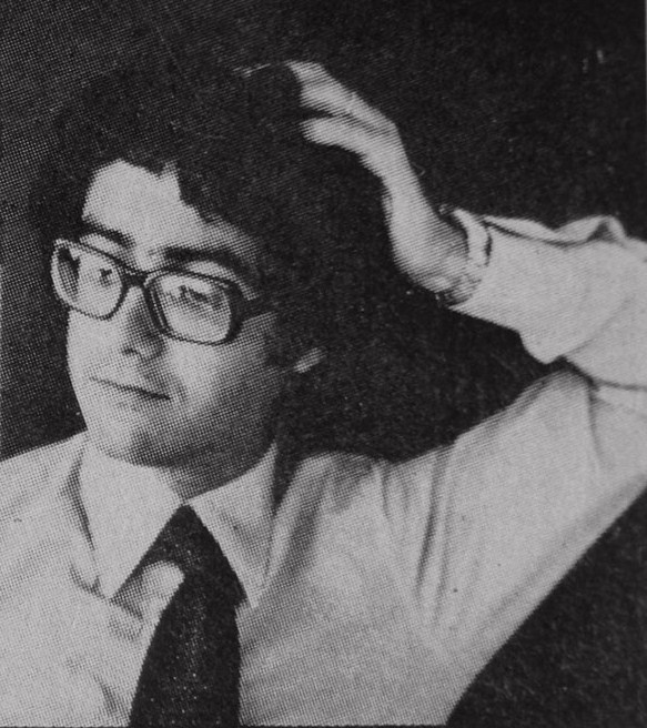 Rafael Viñoly (1944), arquitecto uruguayo de reconocimiento internacional.